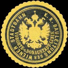 Sealing stamp Title: K.K. Bauleitung der Wiener Stadtbahn Vororte- und Donaustadt-Linie Description: Eisenbahn, schwarz, orange, geprägt Place: Wien size: 4 cm